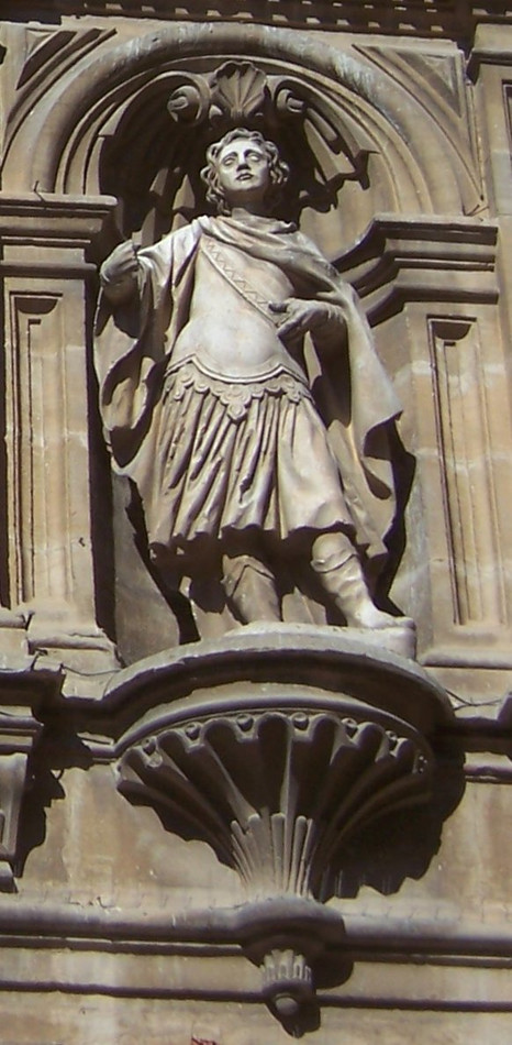 San Celedonio - Pórtico de la Catedral de Santo Domingo de la Calzada